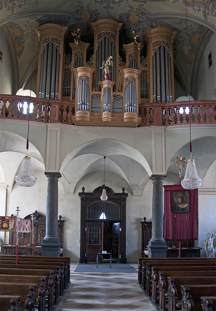 Pfarrkirche St. Egid in Klagenfurt, Innenansicht mit Orgel